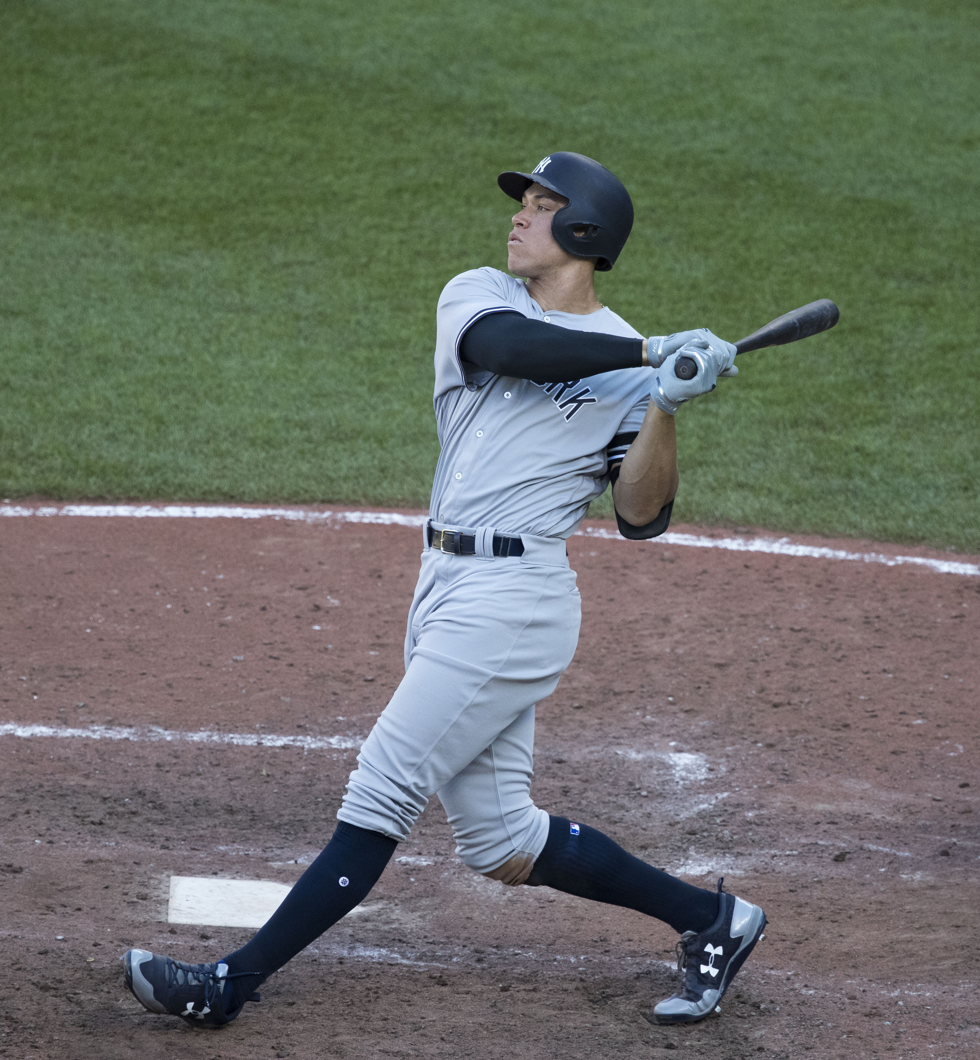 Yankees at Orioles 9/7/17